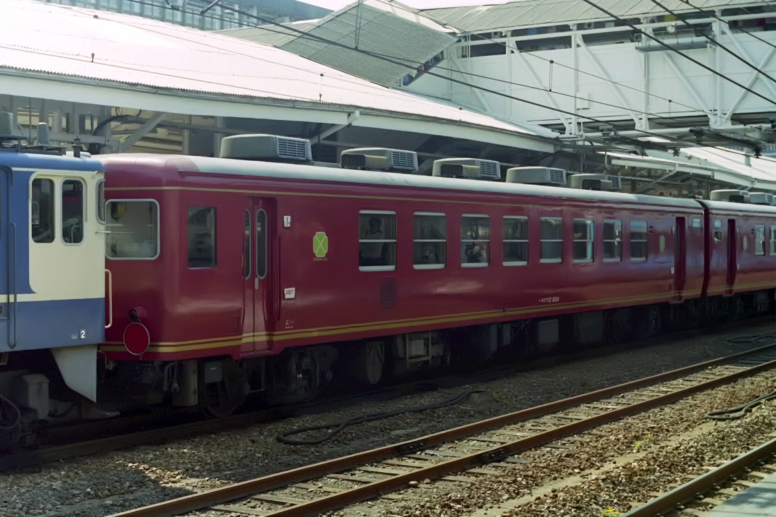 スロフ12 809 「旅路」リニューアル前旧塗装 岡山駅